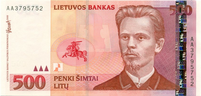 Lithuania 500 litu 2000